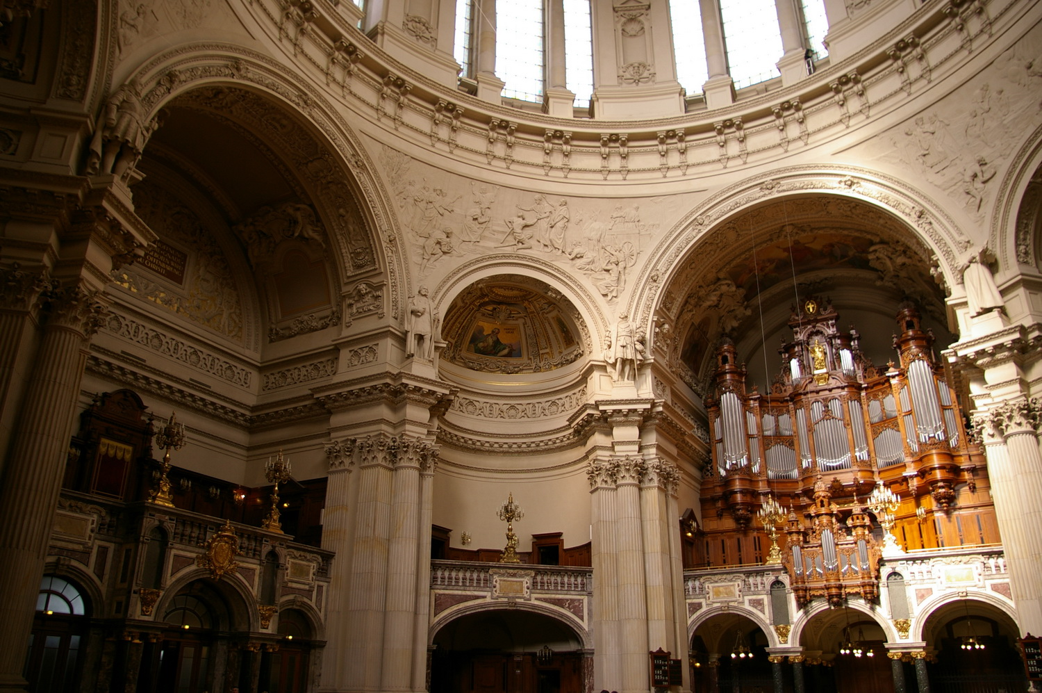 Berliner Dom